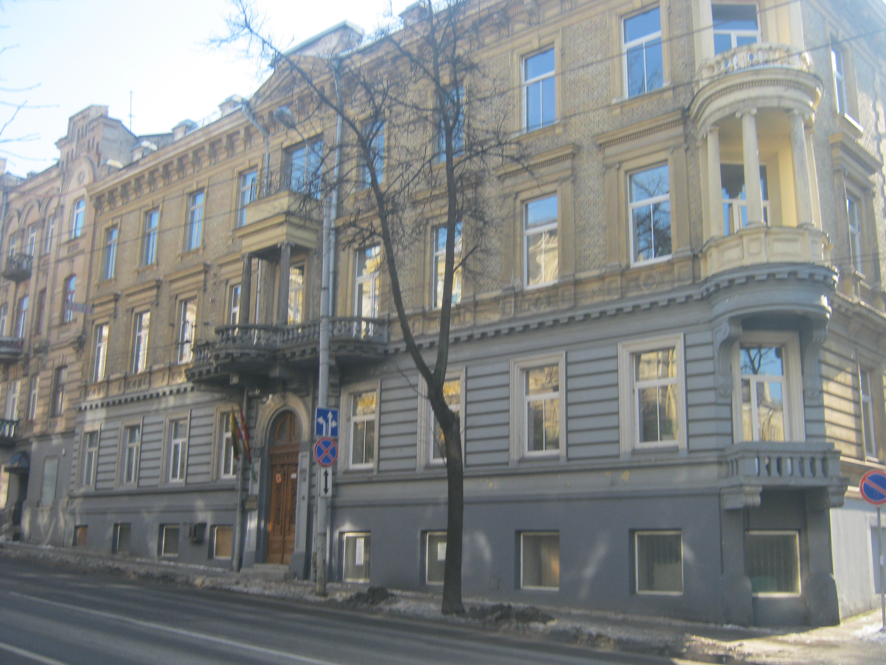 Vilnius